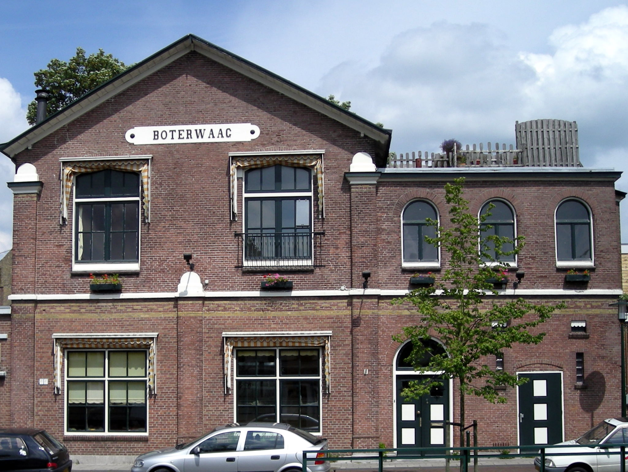 Waag in Gorredijk